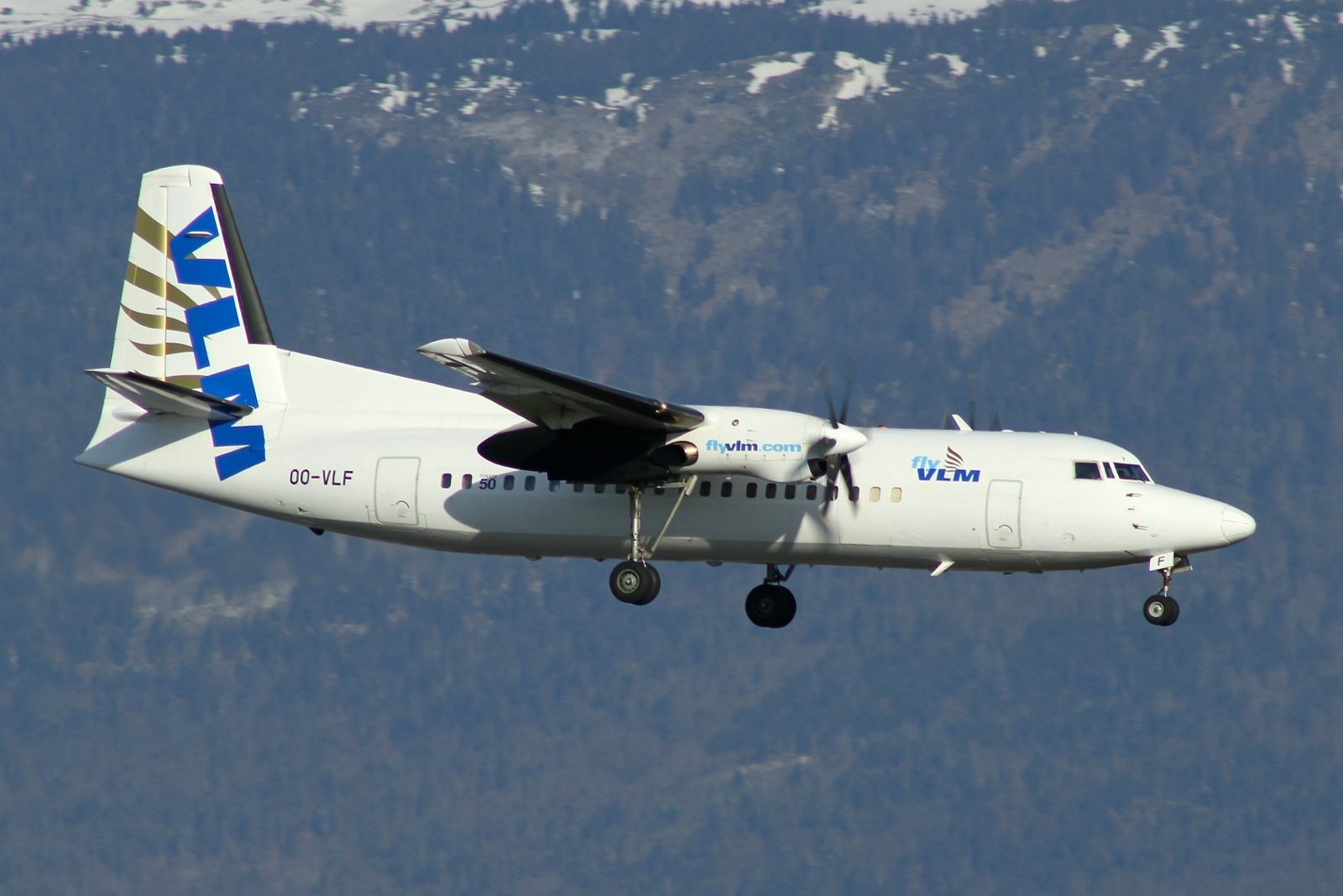 VLM Airlines OO-VLF Ginebra - (LSGG / GVA) Fokker 50 cn 20208 Suiza , 08 de abril 2015